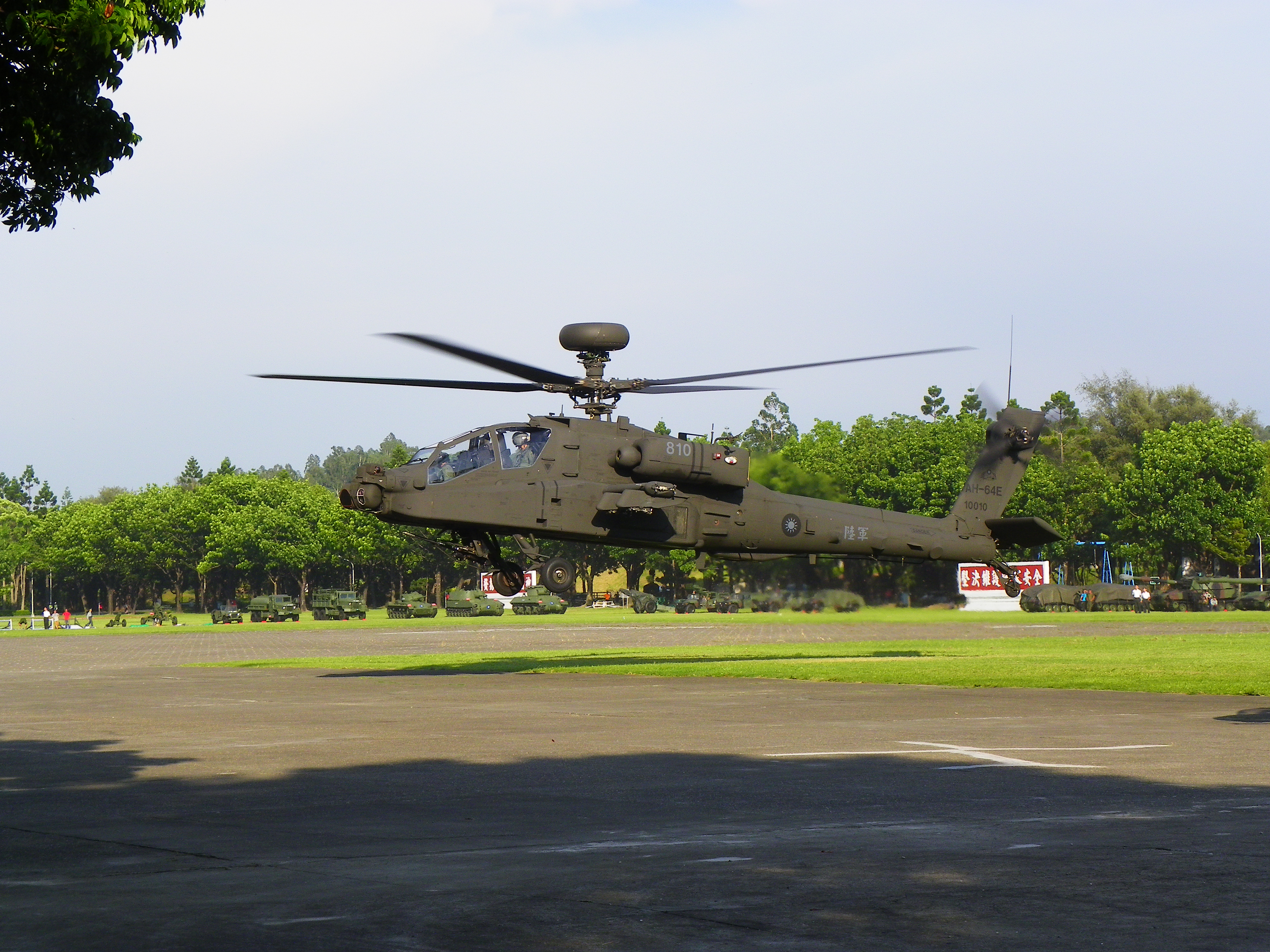 2014年陸軍官校營區開放活動尾聲，暖機完成後，陸航AH-64E 810阿帕契攻擊直升機從操場起飛返回駐地。